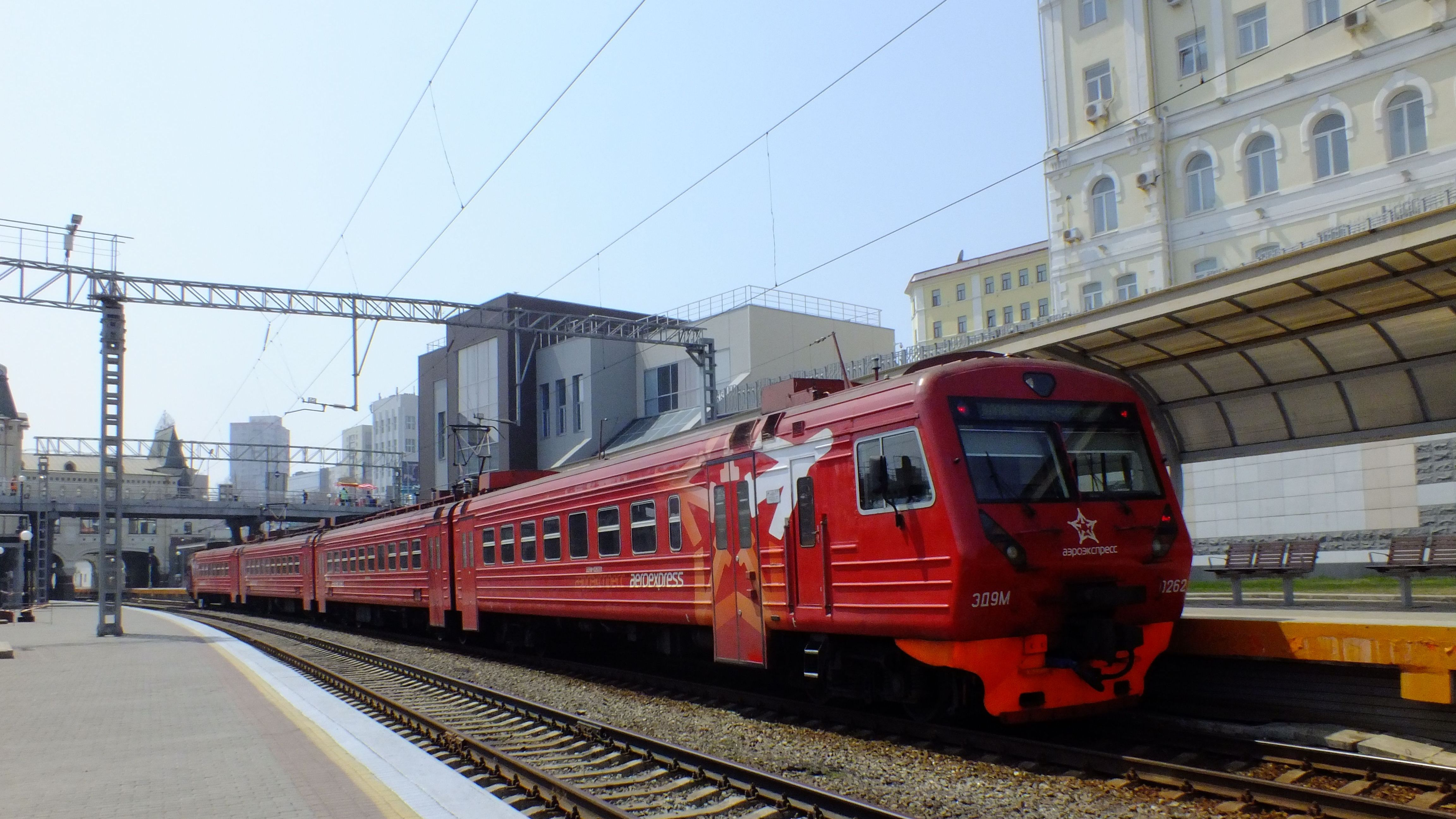 ЭД9М-0262, Владивосток